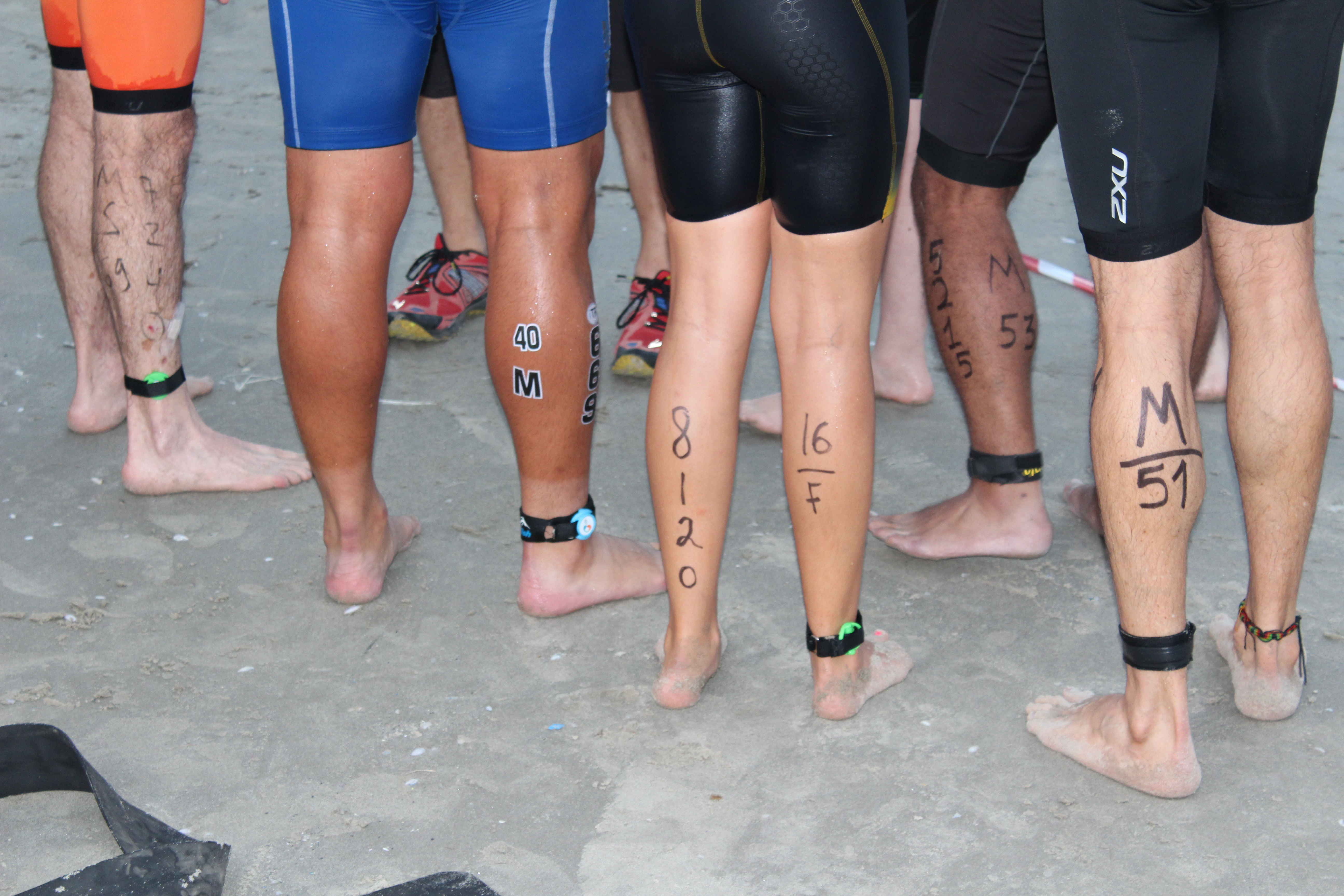 טריאתלון קריית ים. ספטמבר 2017